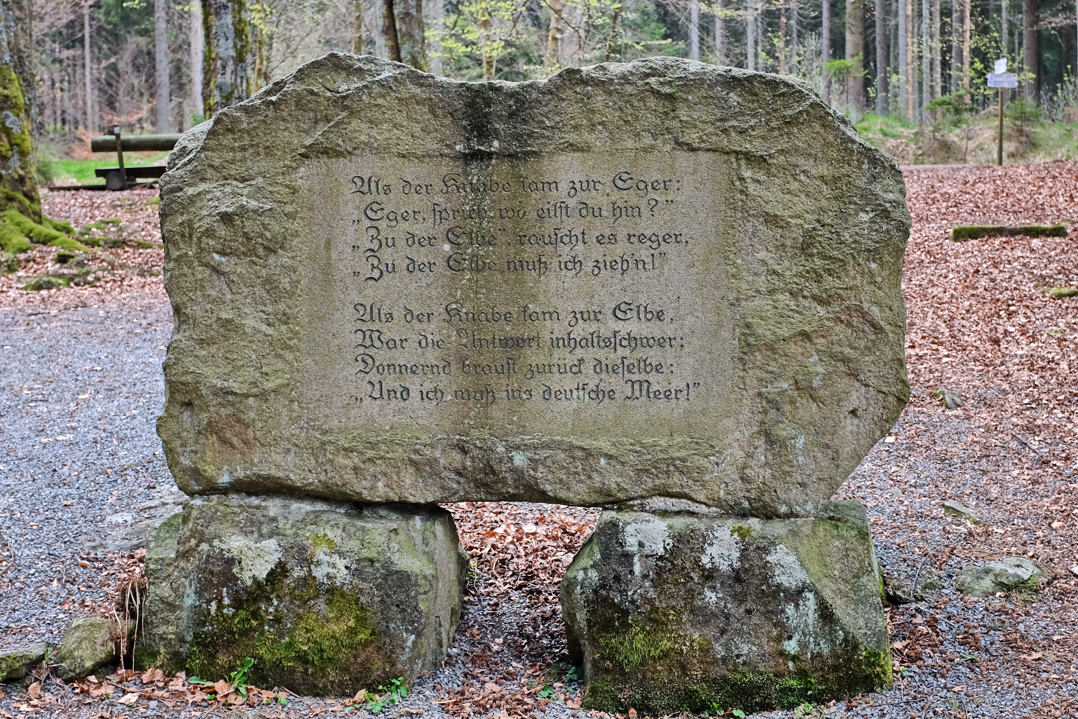 Pramen Ohře ve Smrčinách, Horní Franky, Bavorsko